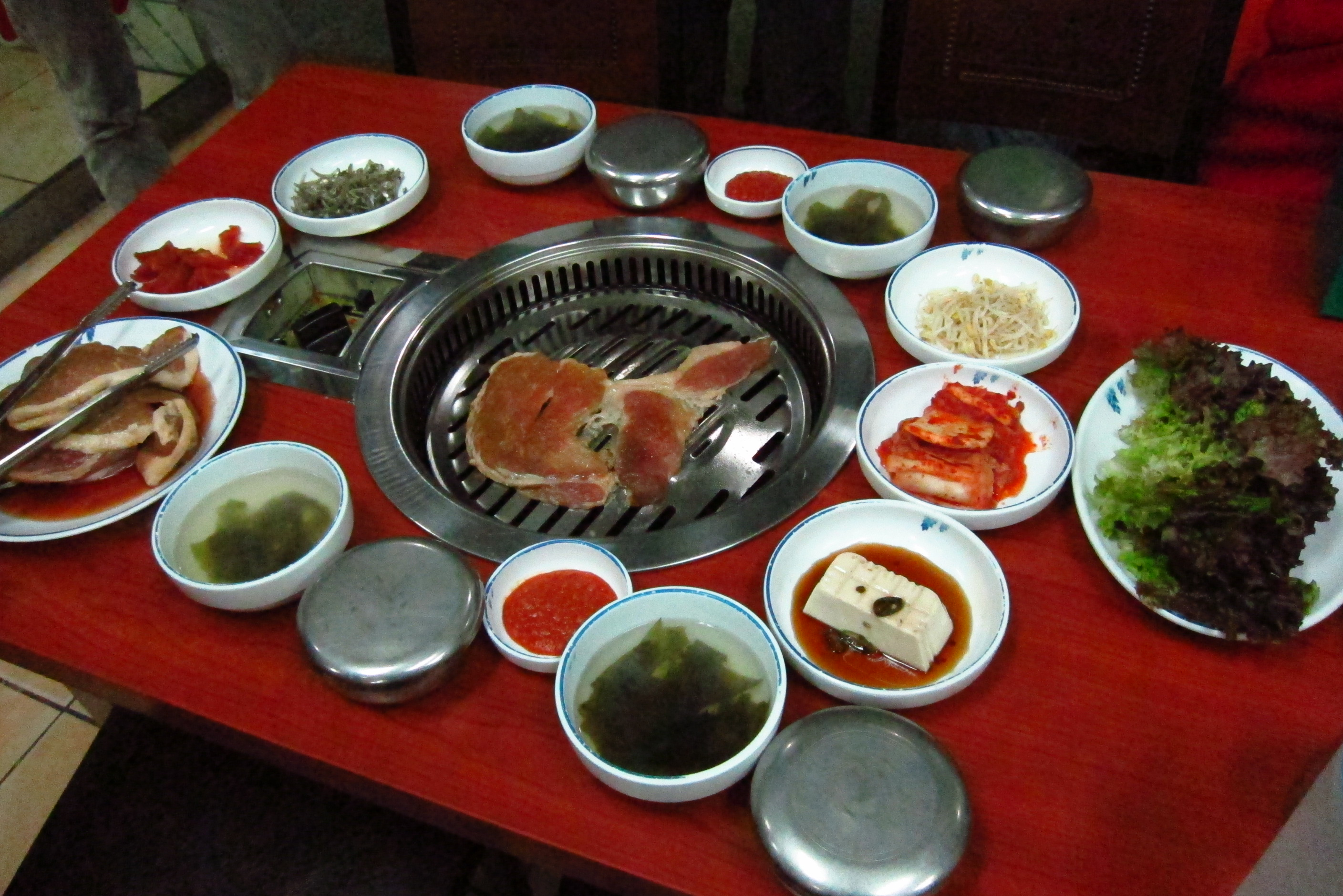 韓國燒烤，豬五花肉。